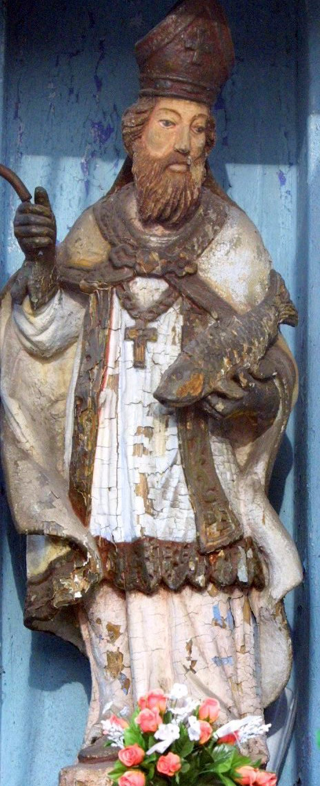 Błogosławiony Bogumił. Barokowa rzeźba w kapliczce w Koźminie.